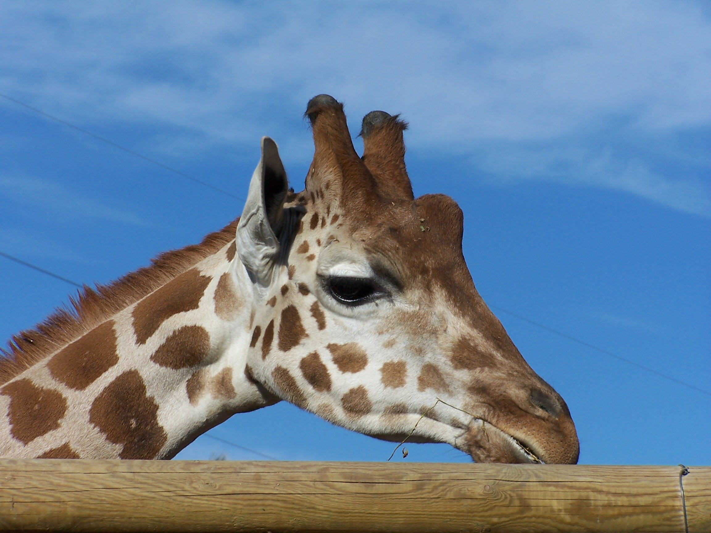 Visit to Terra Natura, Murcia